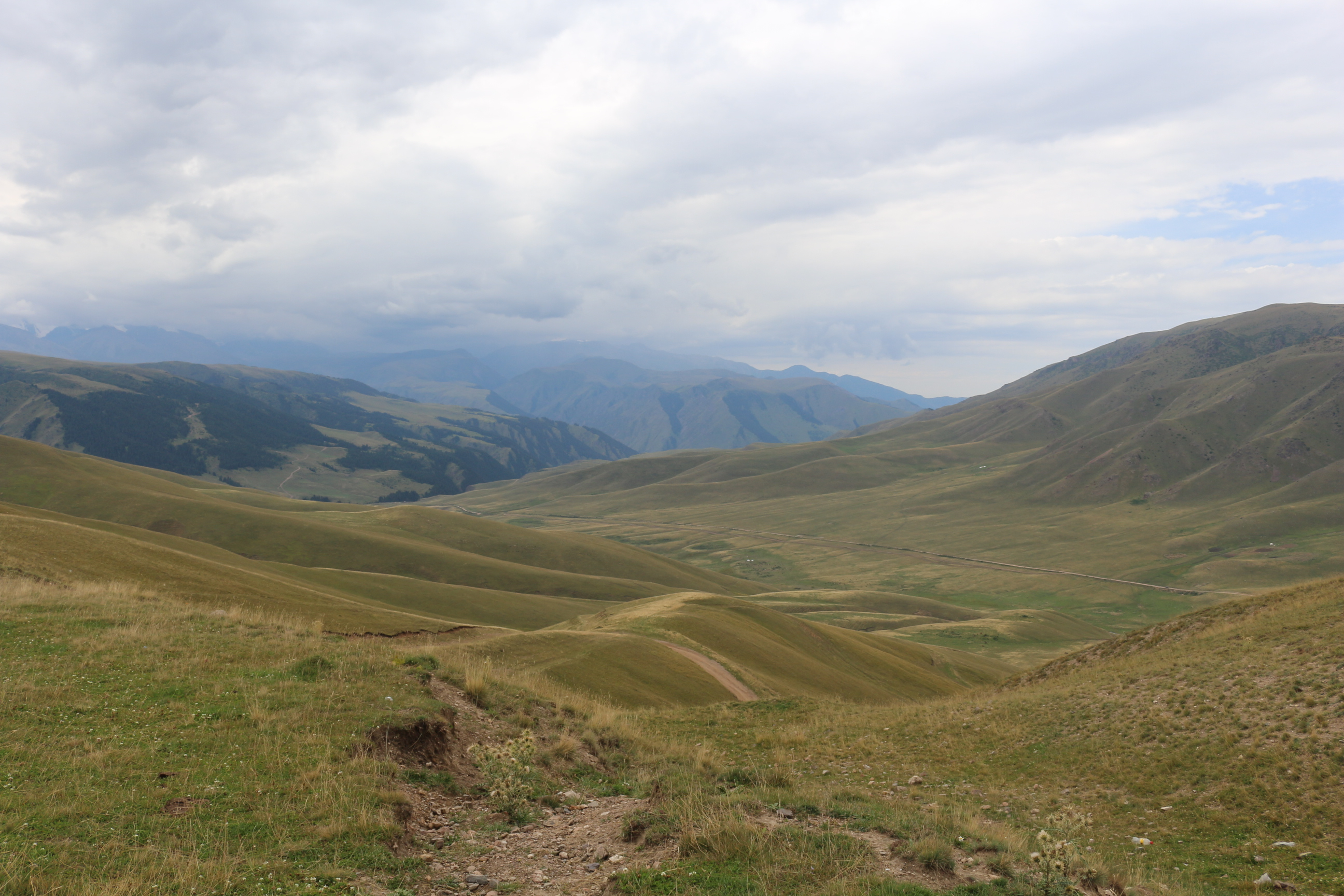 Вид на плато Асы на восток